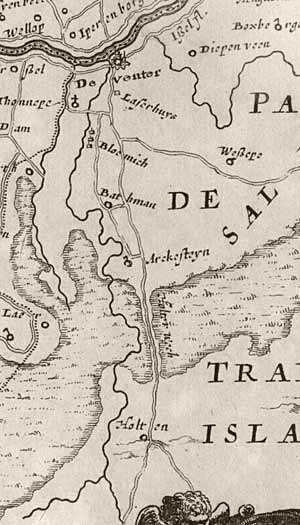 Kaart van de omgeving van Deventer met daarop kasteel Arkelstein. De Middeleeuwse verbindingsweg tussen Deventer en het Duitse grensgebied, via Holten en door Twente, voert vlak langs de grens met Gelre. De grens is grofweg de Schipbeek. De bisschop van Utrecht laat daarom een landweer aanleggen en kastelen bouwen. Bij Holten voert de weg door een groot moerasgebied. Bovenin is het klooster Ter Hunnepe of Honnepe zichtbaar en in het midden kasteel Arckesteyn of Arkelstein.